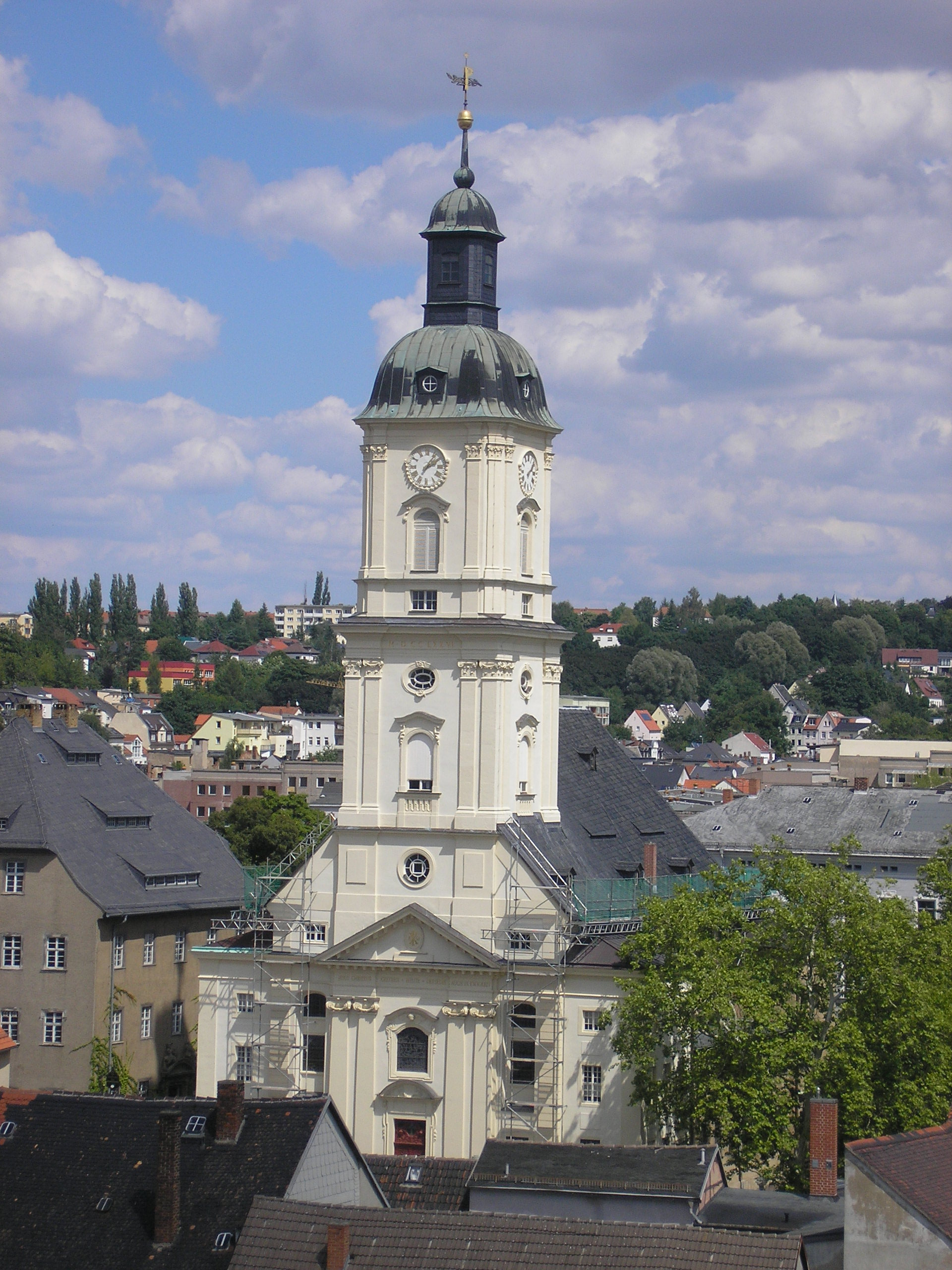 Die Salvatorkirche in Gera (Thüringen).